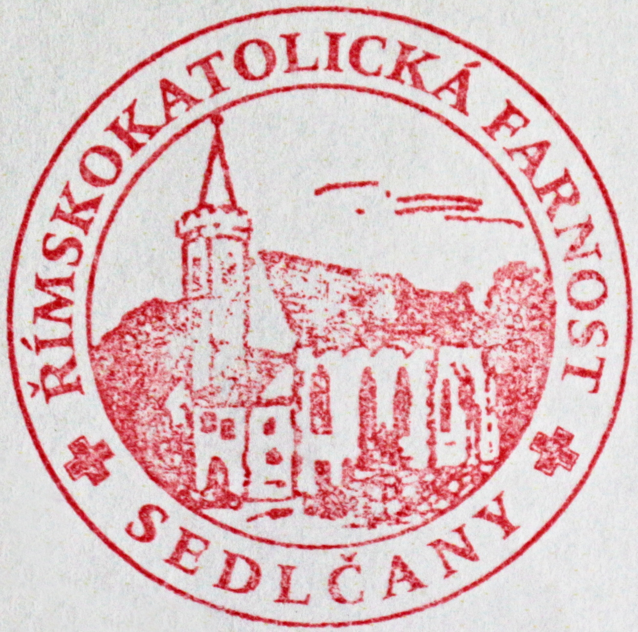 Sedlčany, kostel sv. Martina